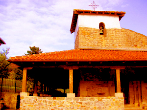 Ermita de San Pelaio